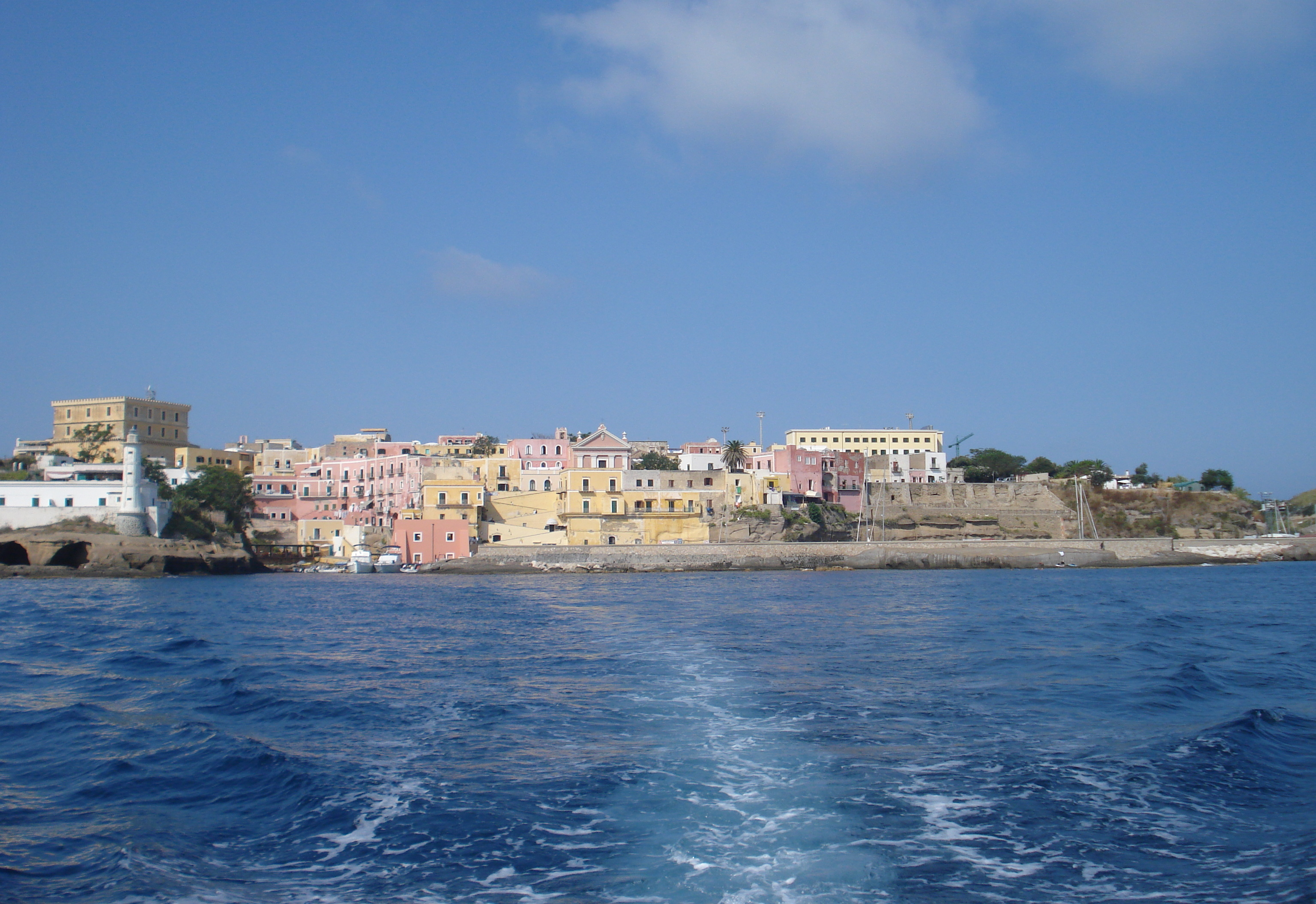 Isola di Ventotene (porto Romano) dal mare